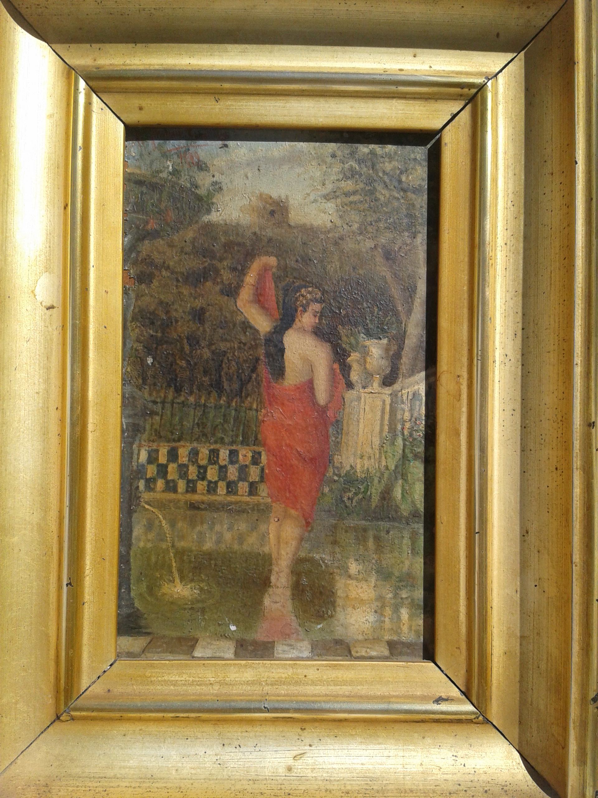 Óleo sobre tabla del pintor sevillano Nicolás Jiménez Caballero Apériz (más conocido como Alpériz) Firmada en el ángulo superior izquierdo como Nicolás Jiménez Caballero y fechada en 1898. Medidas 12x19cms. Escena costumbrista con mujer jover en pie, de espaldas al espectador con la cabeza vuelta de perfil sobre su hombro derecho y posando junto al surtidor de una fuente en el patio de un palacio sevillano. Parece salir del estaque tras el baño y se dispone a envolver su cuerpo con una túnica de seda roja. A la derecha una escalinata monumental con balaustres arranca hacia arriba, indicando que nos encontramos en la parte baja del jardín palaciego. Al fondo exhuberancia de vegetación arbórea destacando por encima del ramaje en el lejano horizonte las altas murallas defendidas por una la torre almenada. Marco con moldura en media caña lisa en madera dorada. Colección particular. Siguiendo fiel a su estilo costumbrista sevillano, Alpériz muestra en esta obra su gran calidad pictórica, su técnica ágil y precisa y su extraordinaria factura en el manejo de colores cálidos y composiciones precisas que recrean ambientes acogedores y agradables evocando rincones intimistas y cargados de serena belleza